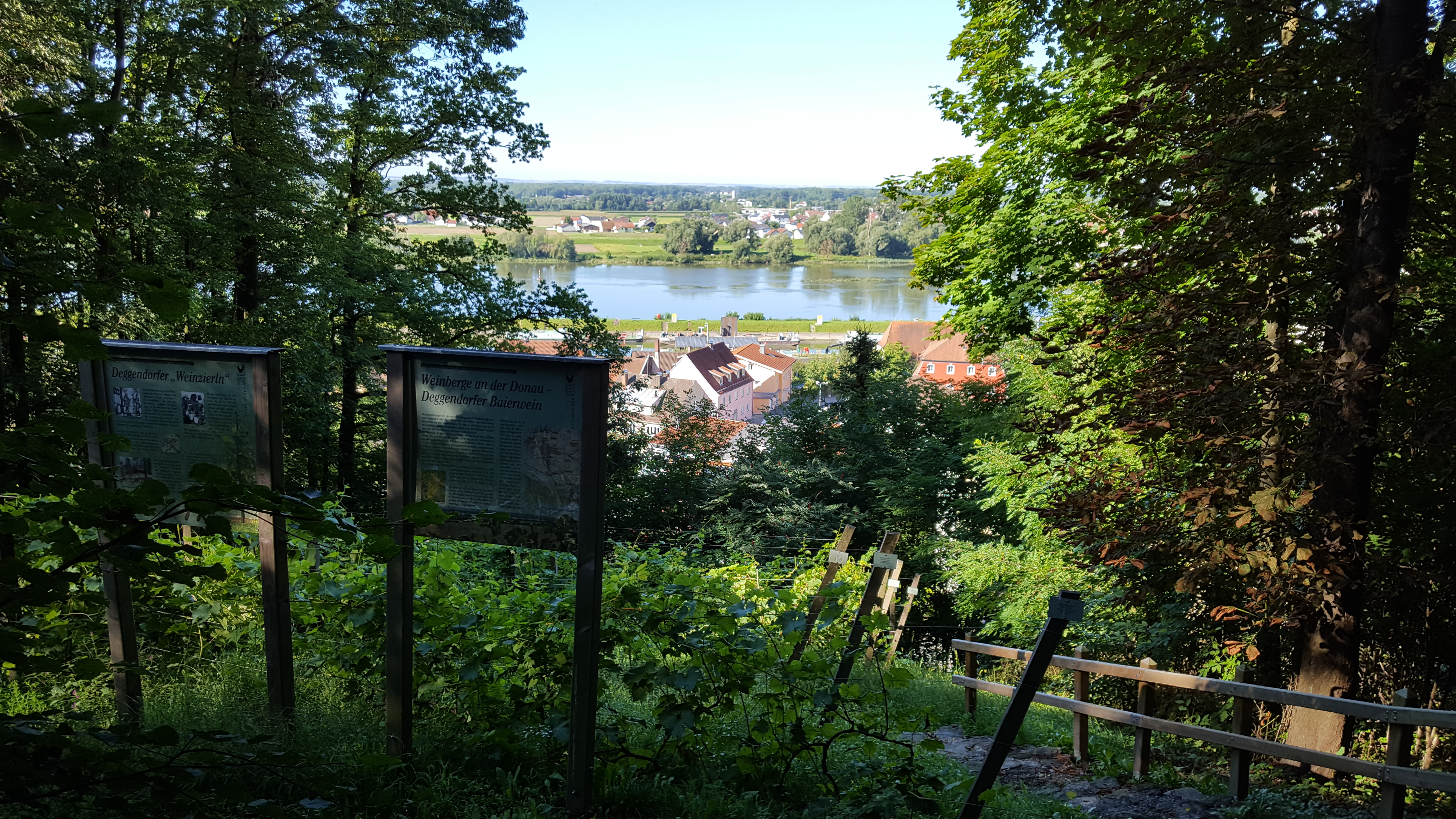 Infotafel im Stadtwald Geiersberg zum Baierwein